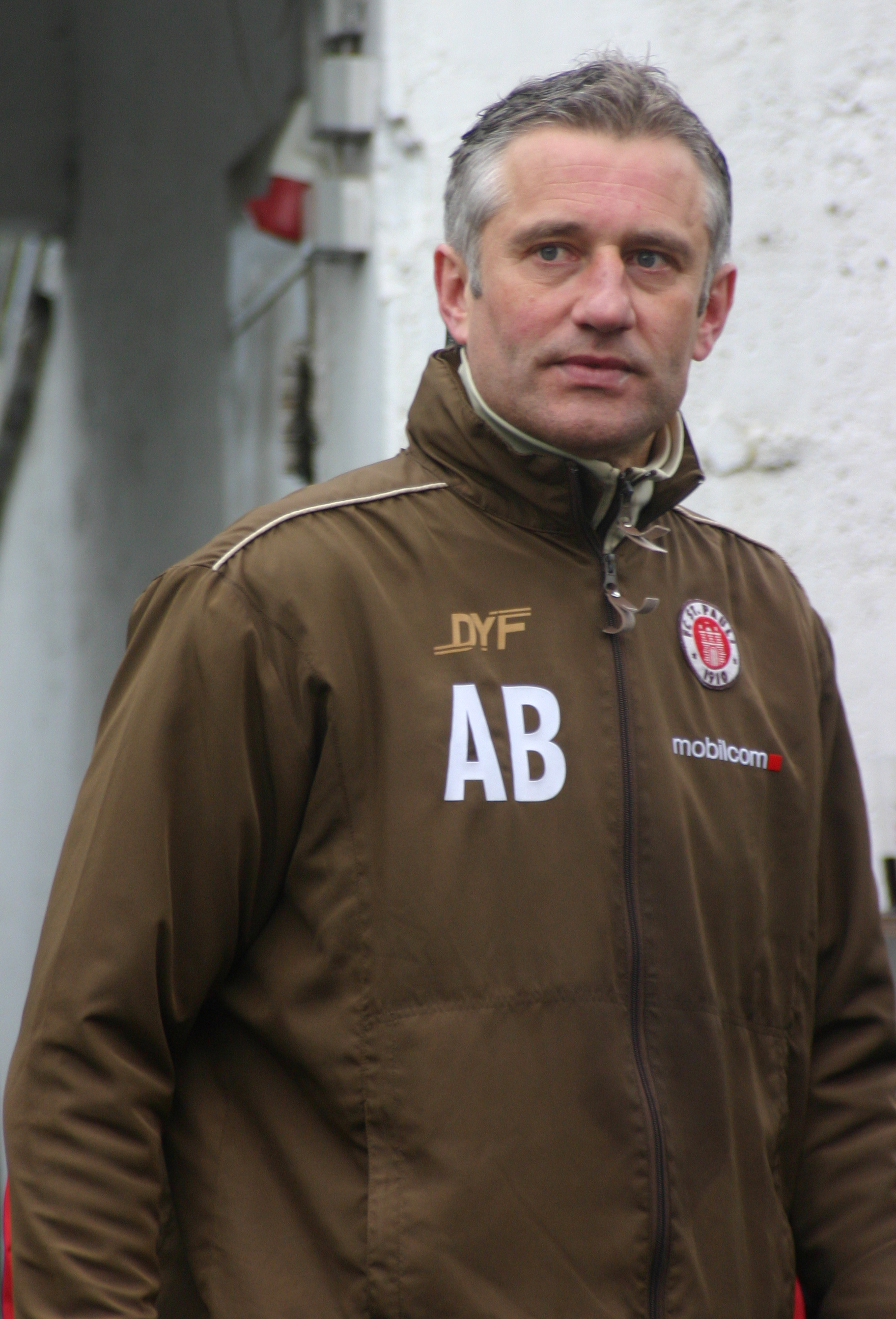 Andreas Bergmann - Chef-Trainer des FC St. Pauli vor im Millerntor Stadion in Hamburg